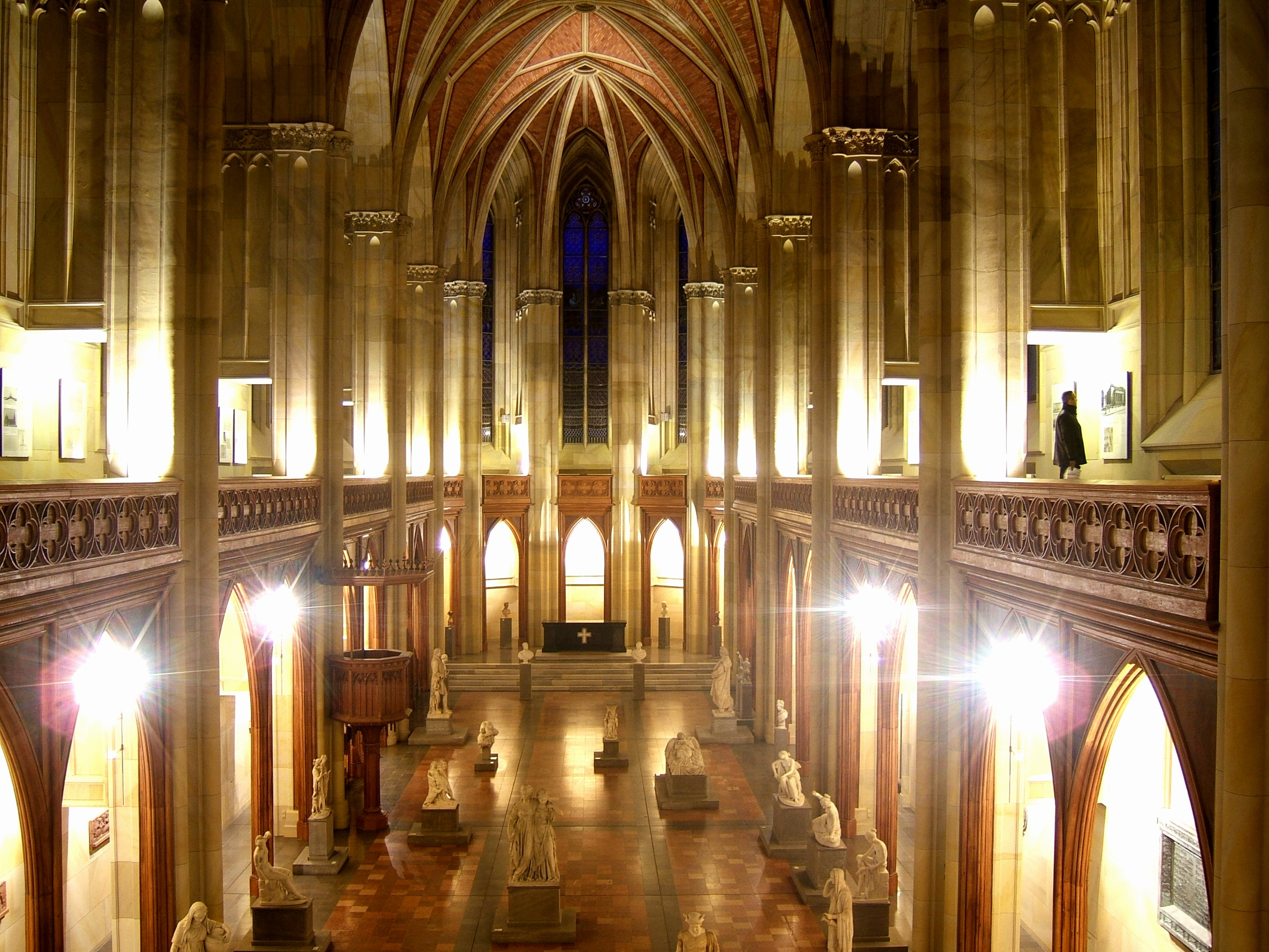 Friedrichswerdersche Kirche in Berlin